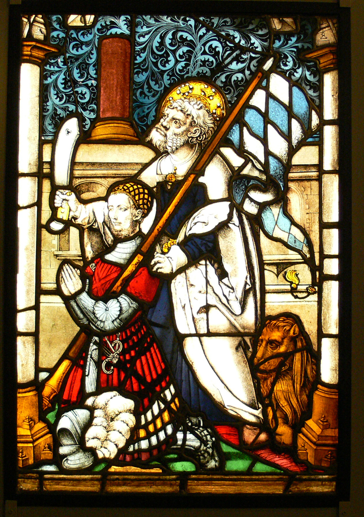 Herzog Wilhelm IV. von Bayern, empfohlen vom hl. Bartholomäus; Glasfenster; München oder Regensburg; Glasfenster aus dem Chor der Klosterkirche der Kartause Prüll in Regensburg Bayerisches Nationalmuseum, München